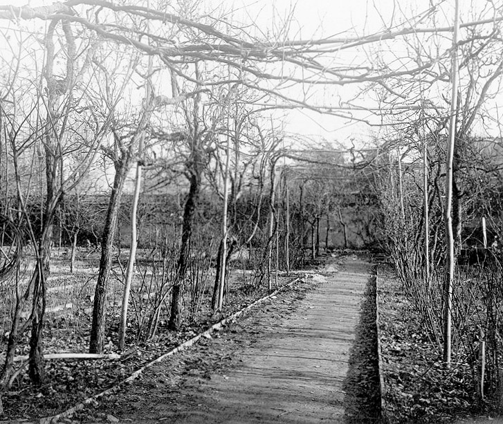 La vigna di Leonardo da Vinci prima della sua distruzione; foto pubblicata da Luca Beltrami nel 1920